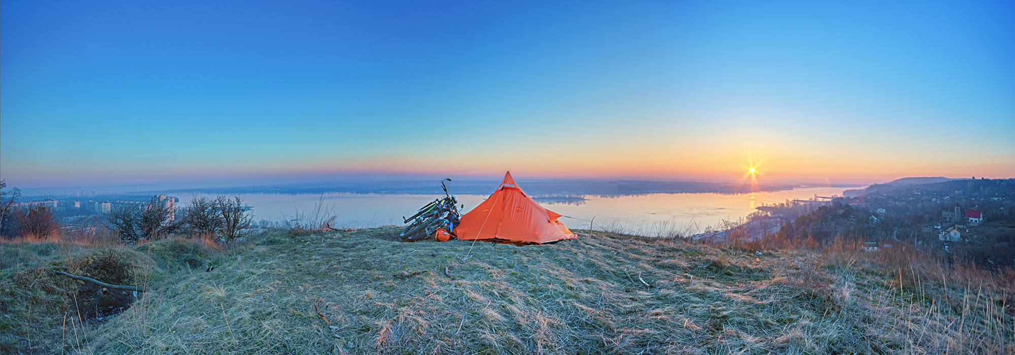 Лиса гора, Канівський район, м. Канів, вул. Ісковшина